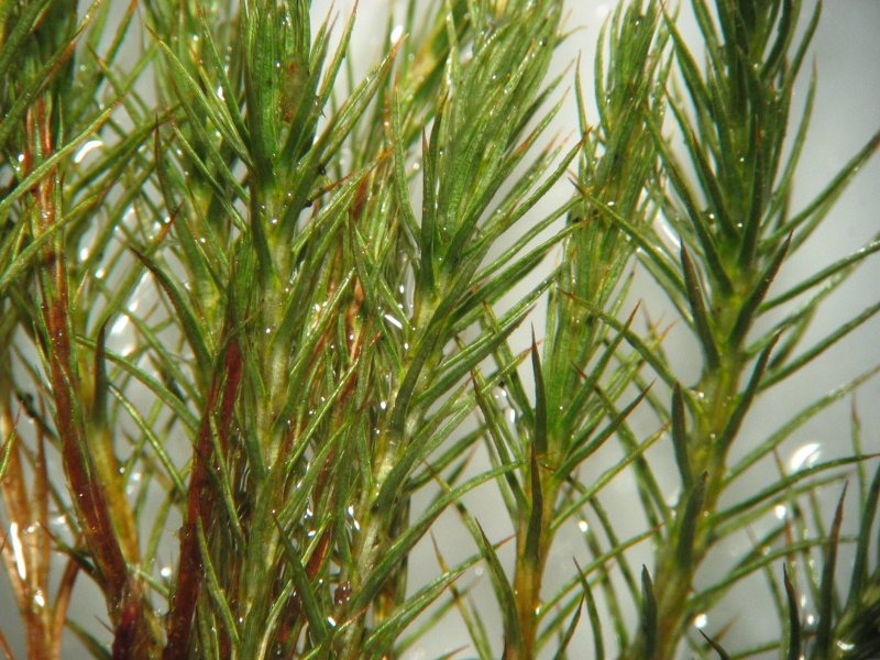 Wacholder-Widertonmoos (Polytrichum juniperinum)